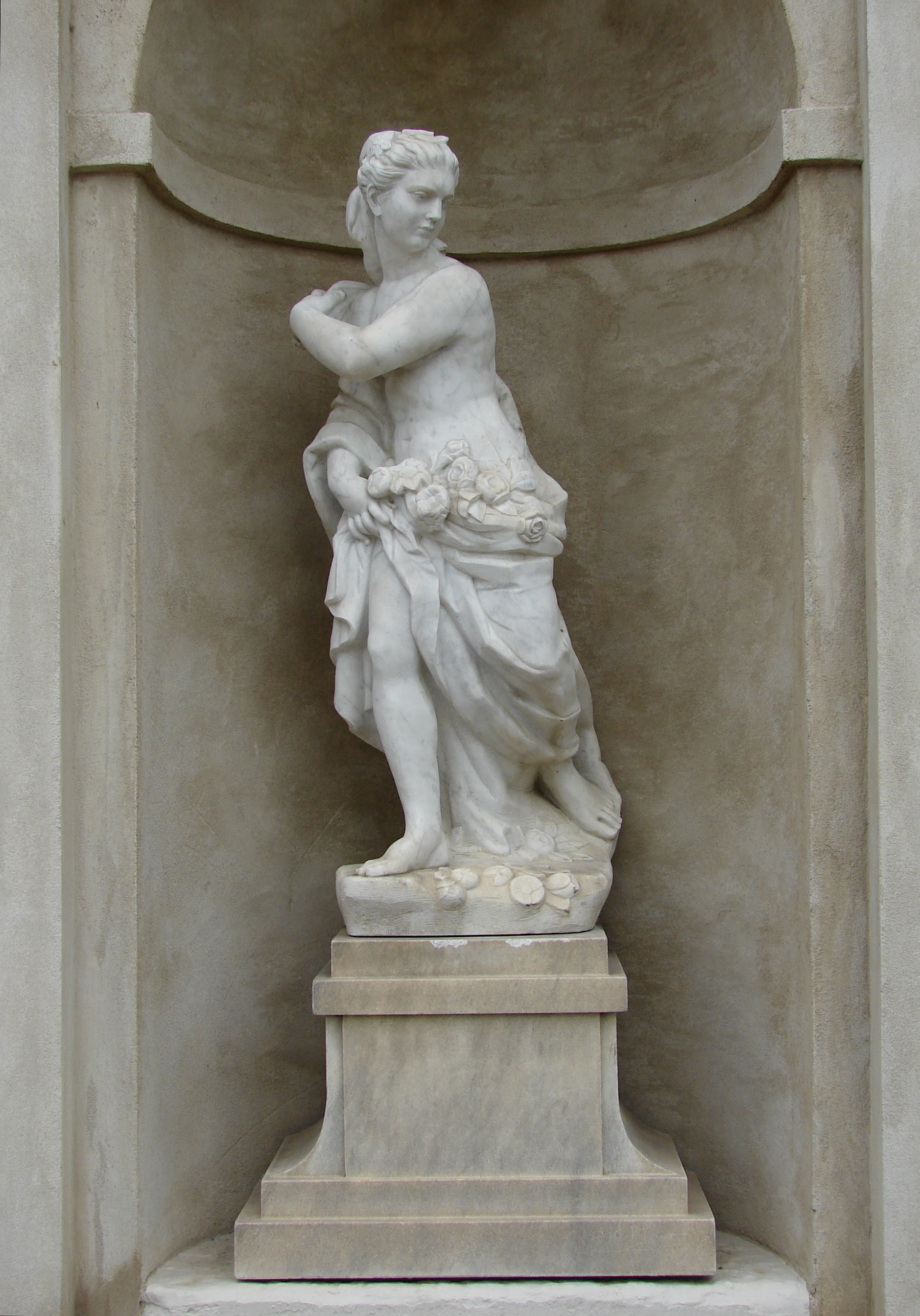 Eurydike, Giovanni Baratta, indkøbt af Frederik IV 1708-09 under sin Italiensrejse, Herkulespavillonen, Kongens Have, København